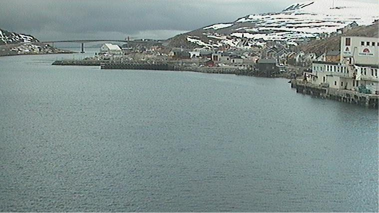 Ansicht von Havøysund, Aufgenommen am 09.04.2004 von Bord eines Hurtigrutenschiffes